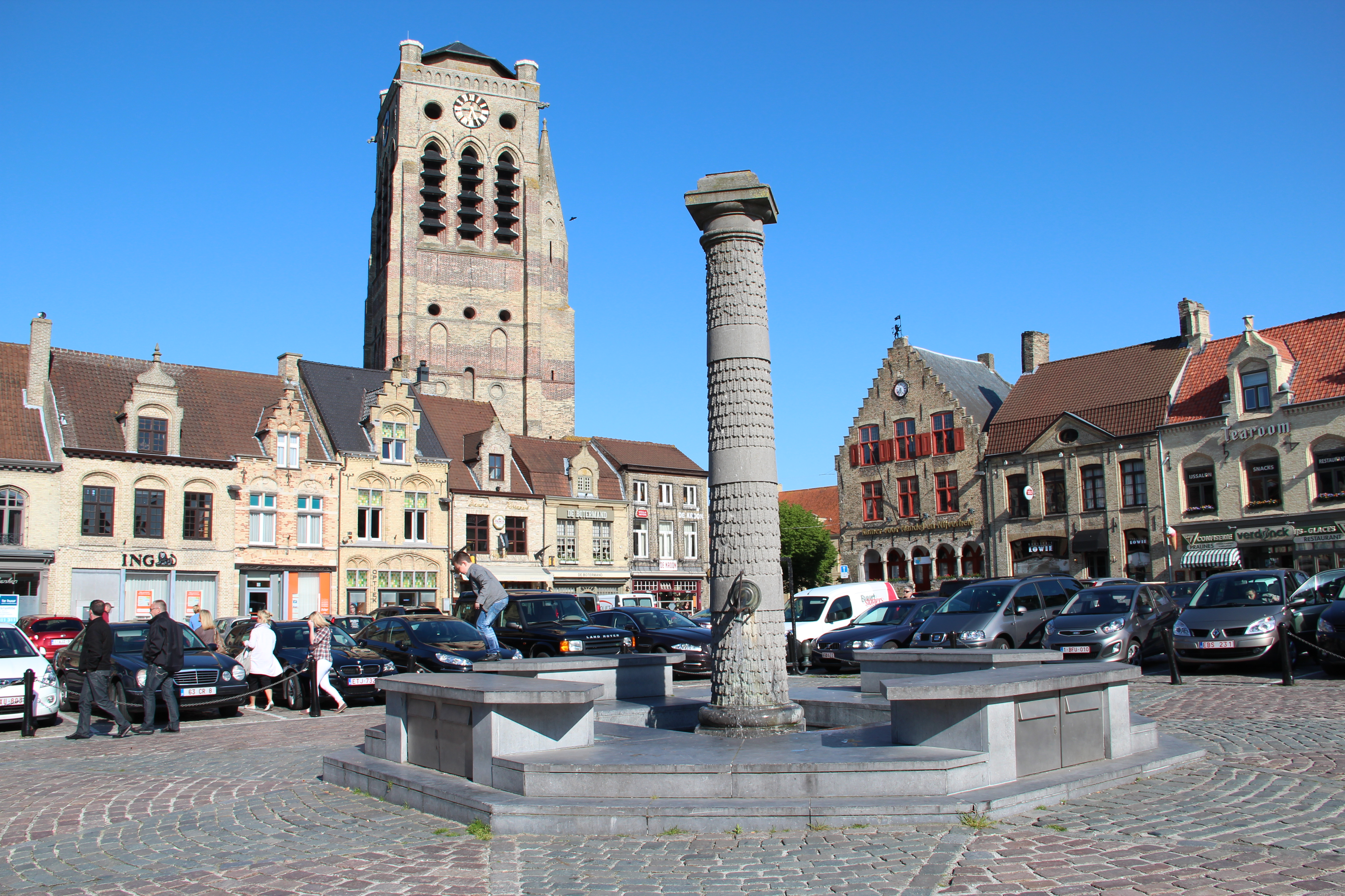 La Grote Markt, l'église Saint-Nicolas et l'ancienne maison du veilleur de nuit ( Hoge Wacht) de Furnes (Belgique)